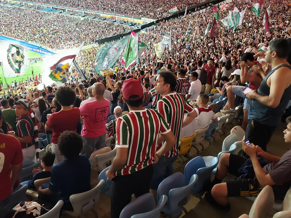 Torcida do Fluminense FC no corredor do Maracanã antes do empate do clube por 0 a 0 em 4 de dezembro de 2019, perante 39.965 torcedores pouco antes da partida começar.